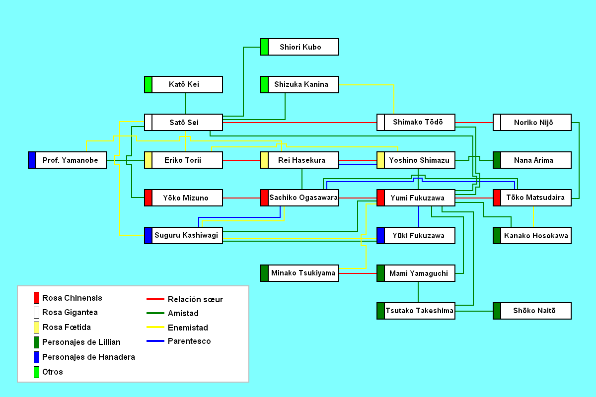 Mapa de personajes de Maria-sama ga Miteru